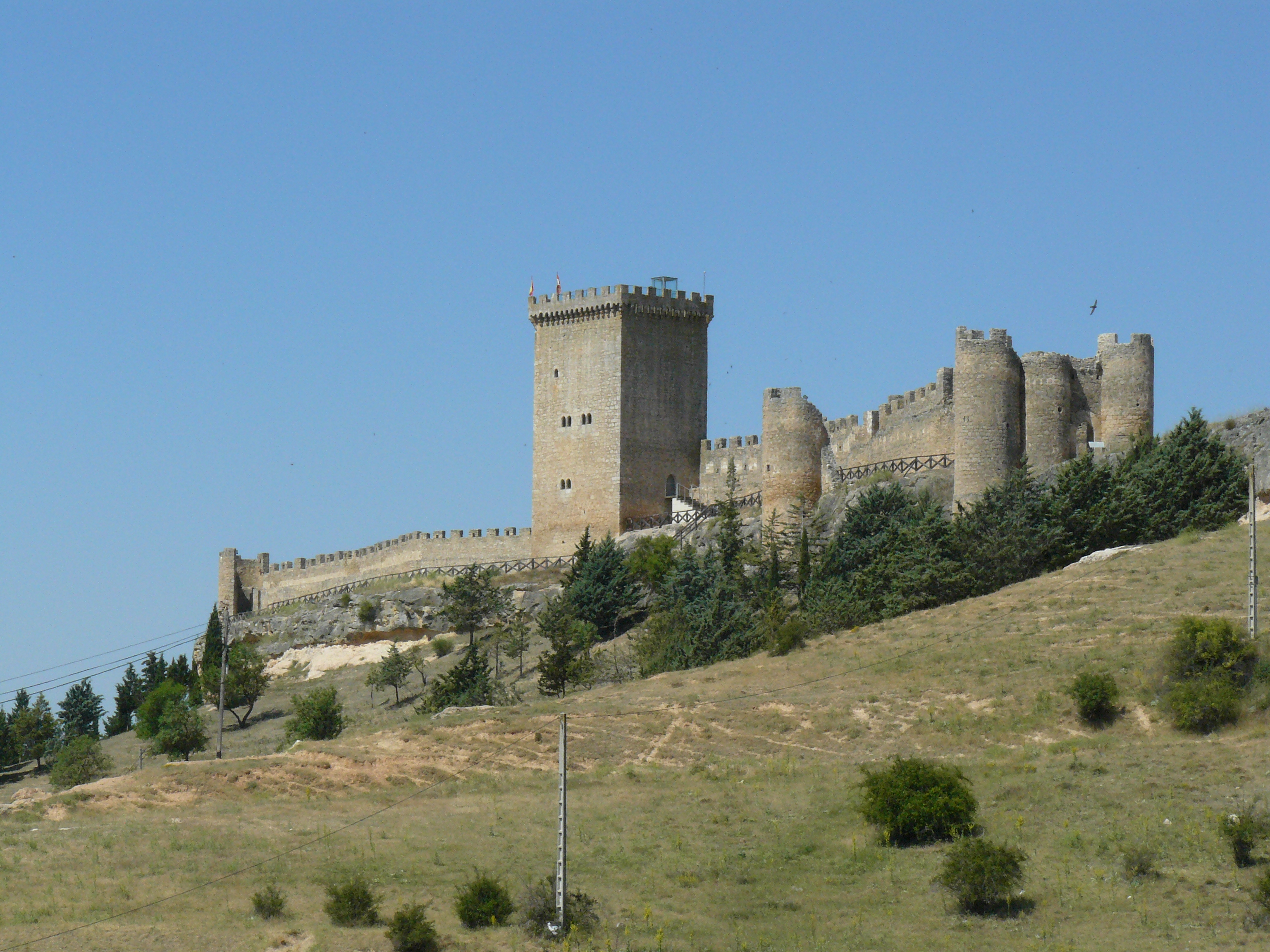 Castillo de Peñaranda de Duero, Burgos.